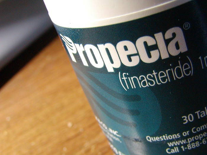 Propecia Bottle closeup